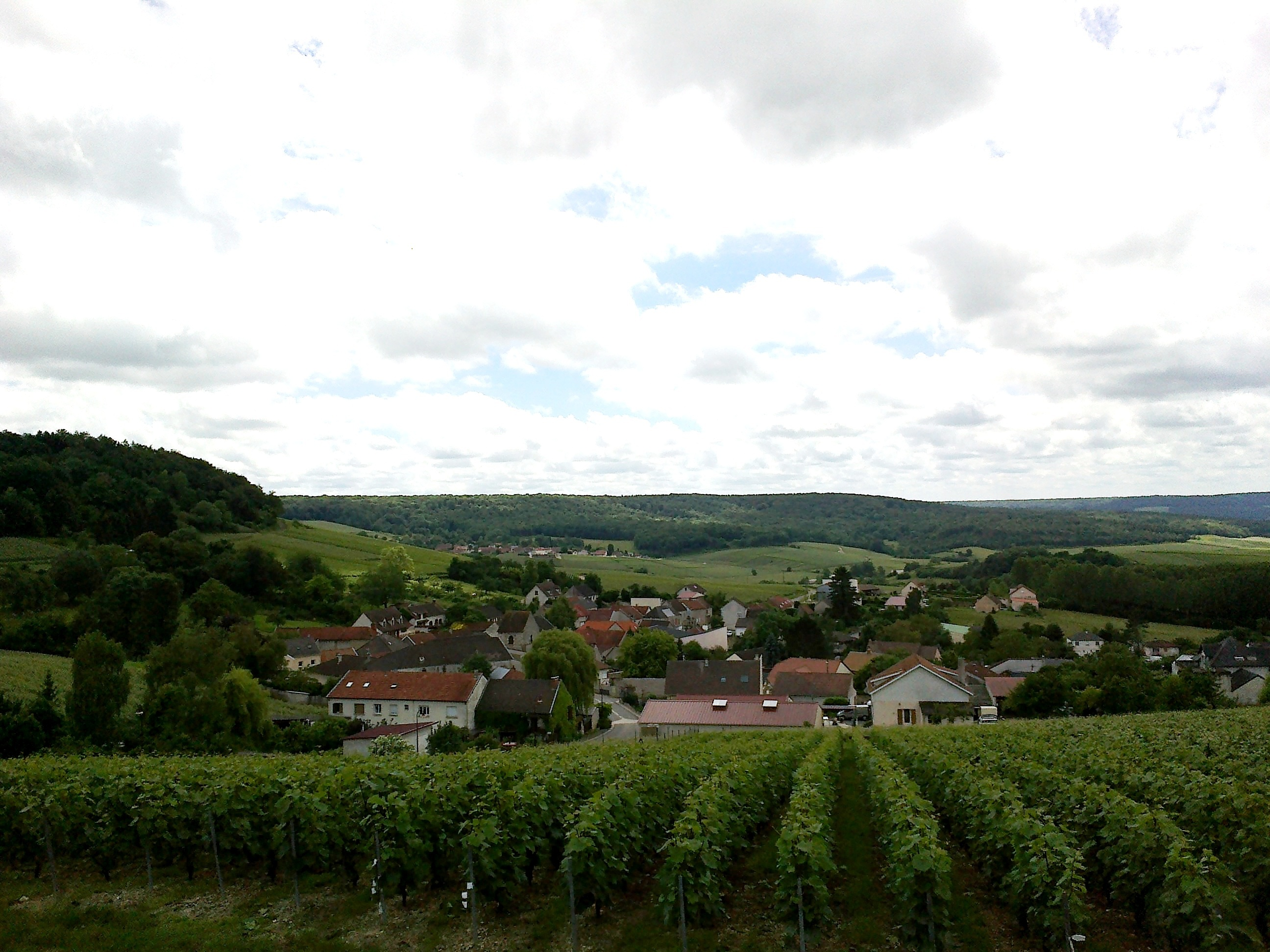 Marne Cormoyeux Forets et Vignes 22062016